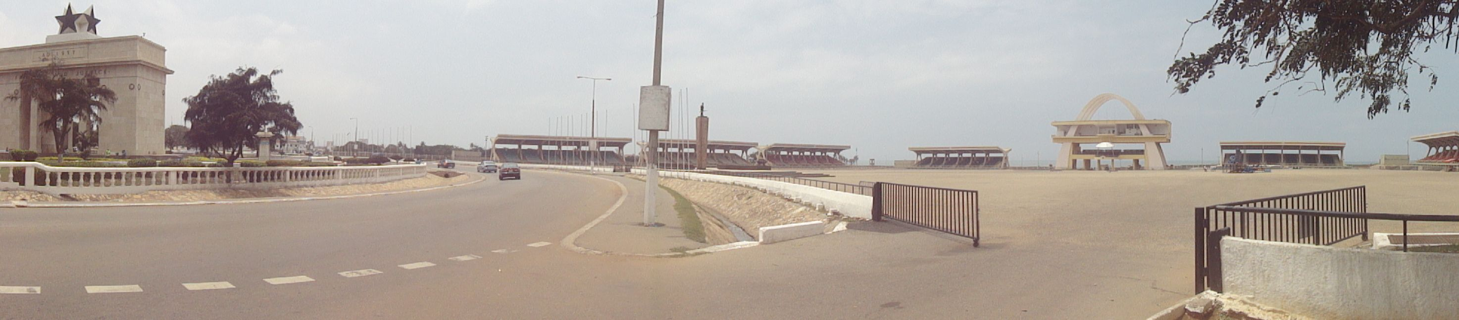 Independence Square, Accra